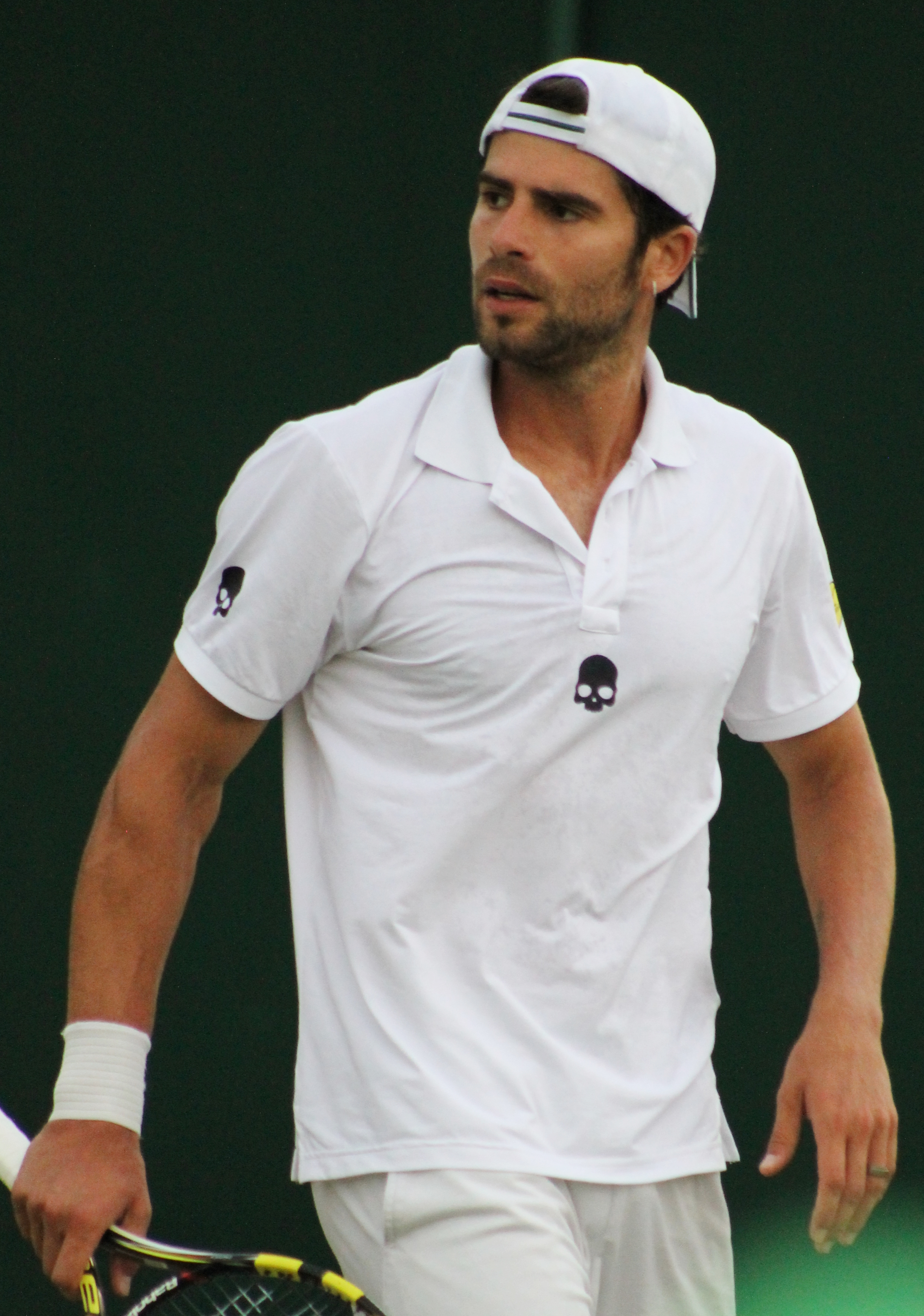 Bolelli WM14 (7)